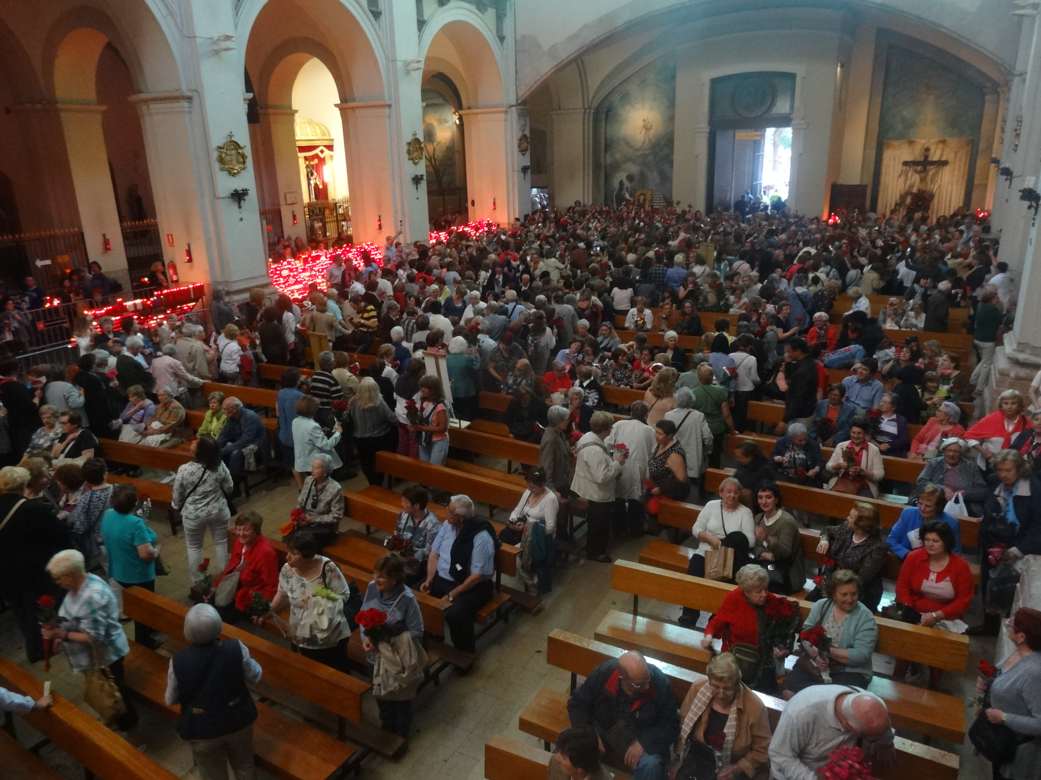 Veneració de Santa Rita a l'església de Sant Agustí del Raval. Barcelona, 22 de maig de 2015.